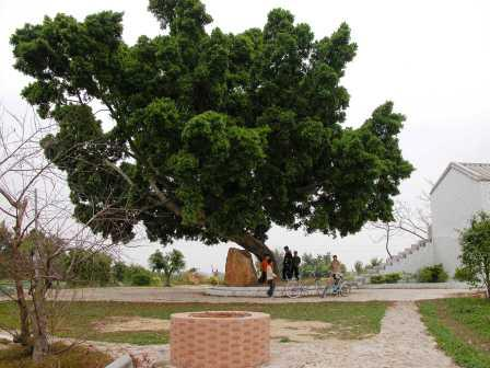 ئۇيغۇرچە / Uyghurche: شەنتۇ شەھىرى.